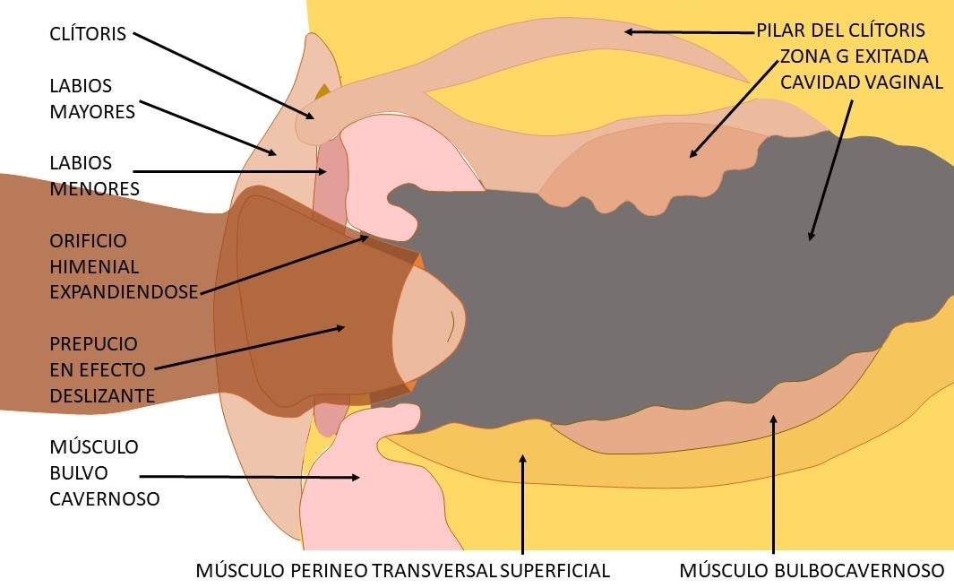 El glande se desliza dentro del prepucio autolubricado y el glande con una mucosa similar a la de la vagina. El prepucio con más del 300% de elongación permite al balano moverse fuerte y rápido sin dañar por abrasión a las paredes de la vagina.